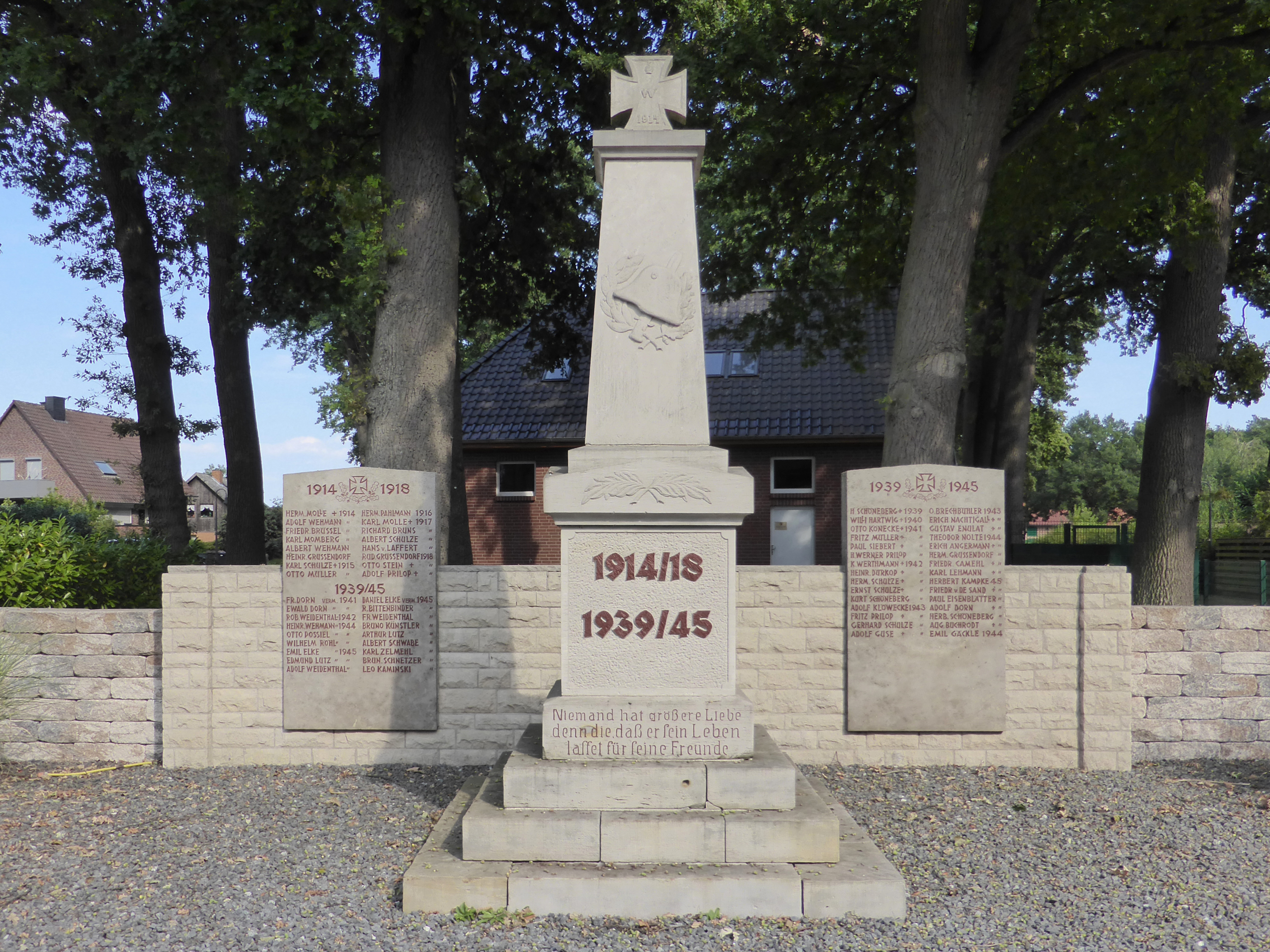 Kriegerdenkmal für die Toten der beiden Weltkriege in Dannenbüttel.